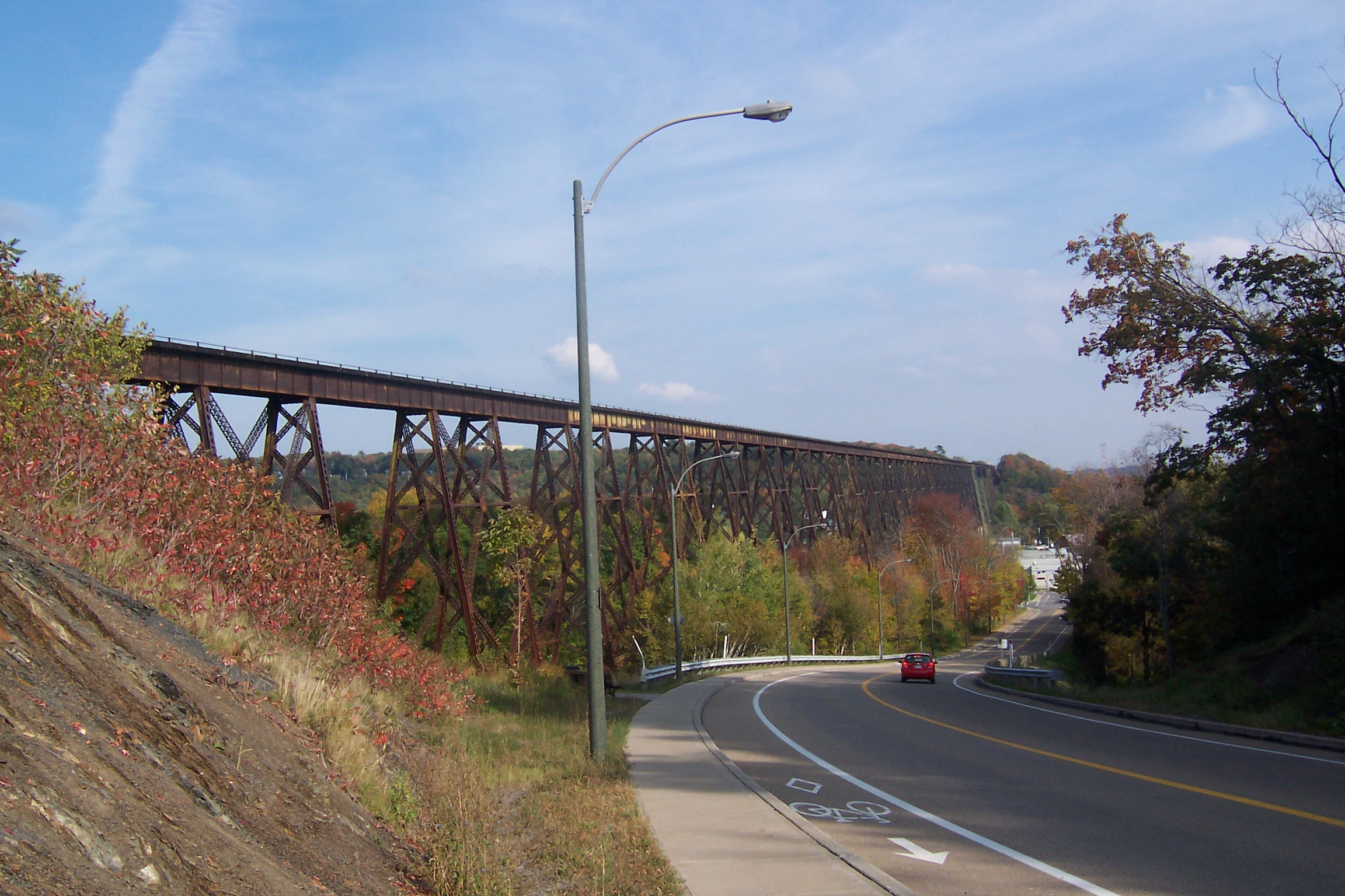 Le tracel (pont de chemin de fer) de Cap-Rouge vu de la rue de la Promenade-des-Soeurs. Vue en direction est.